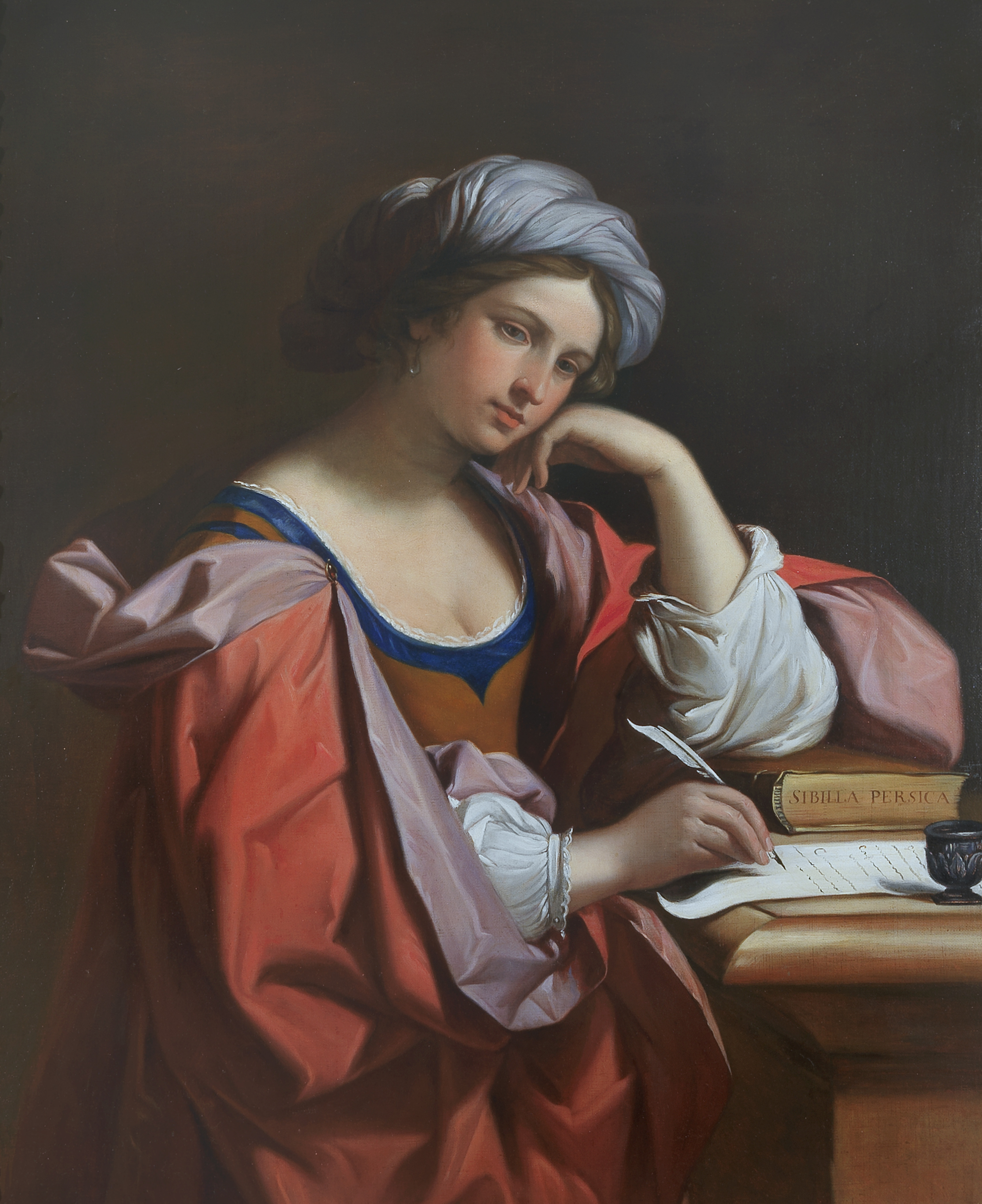 Sibilla Persica, Olio su tela 95,5 x 114,5 cm, Collezione Mainetti (Roma)